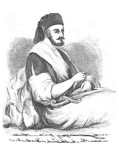 Painting from William Francis Lynch book The Narrative of the United States Expedition of the River Jordan and the Dead Sea. Published in 1849 ציורים מספרו של ויליאם פרנסיס לינץ' שחקר את הירדן וים המלח בשנת 1848. הספר פורסם בשנת 1849 קיל אגא אל-חאסי, מצרי במוצאו, נמנה עם השבט הבדואי חוארה, היה אחד מהמלווים של המשלחת של לינץ'